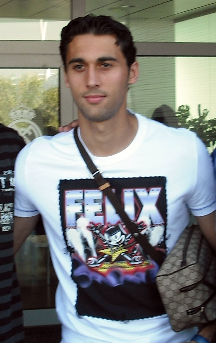 Alvaro Arbeloa con miembros del CD Altorricón